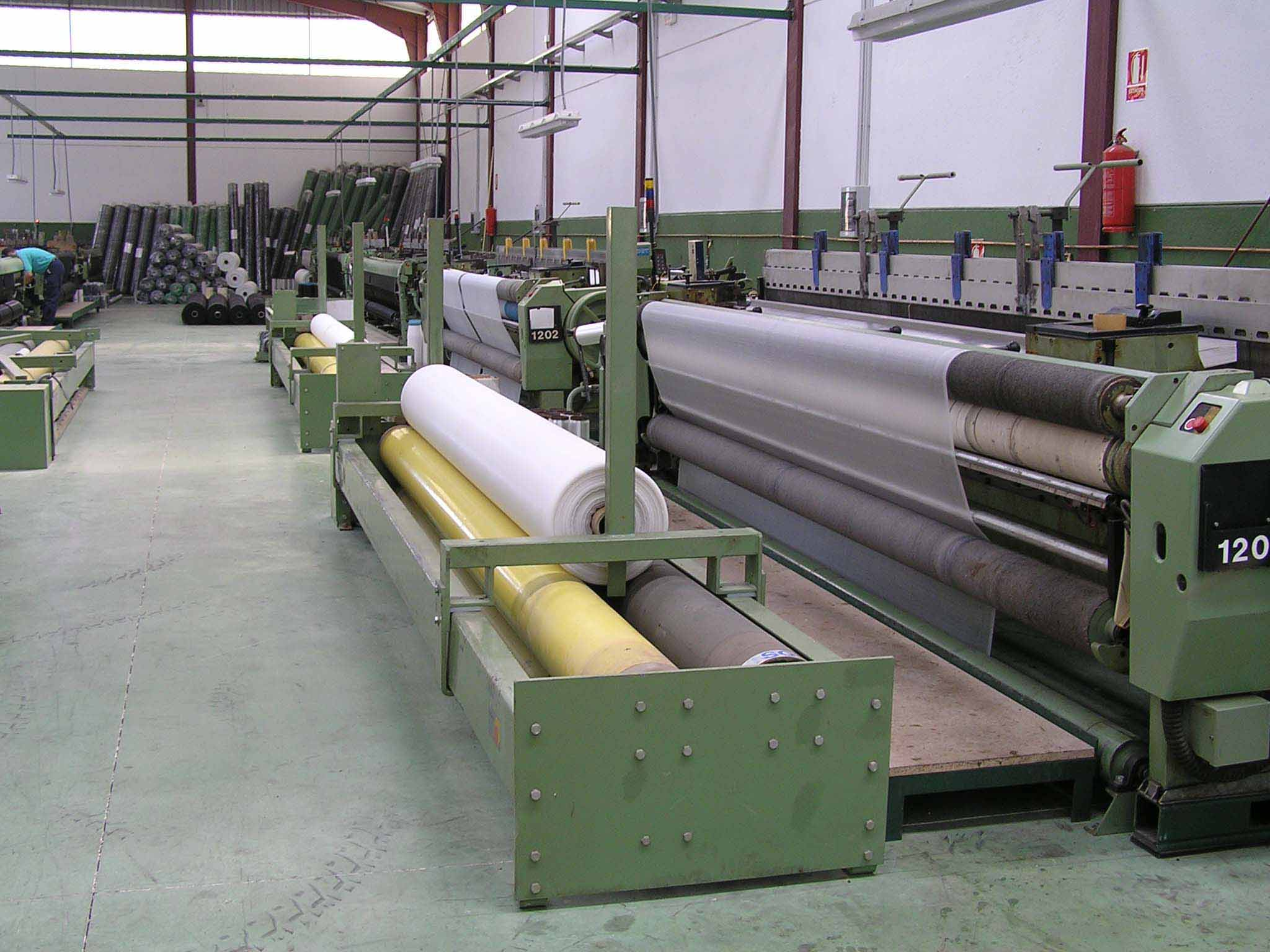 Teler Frailes.